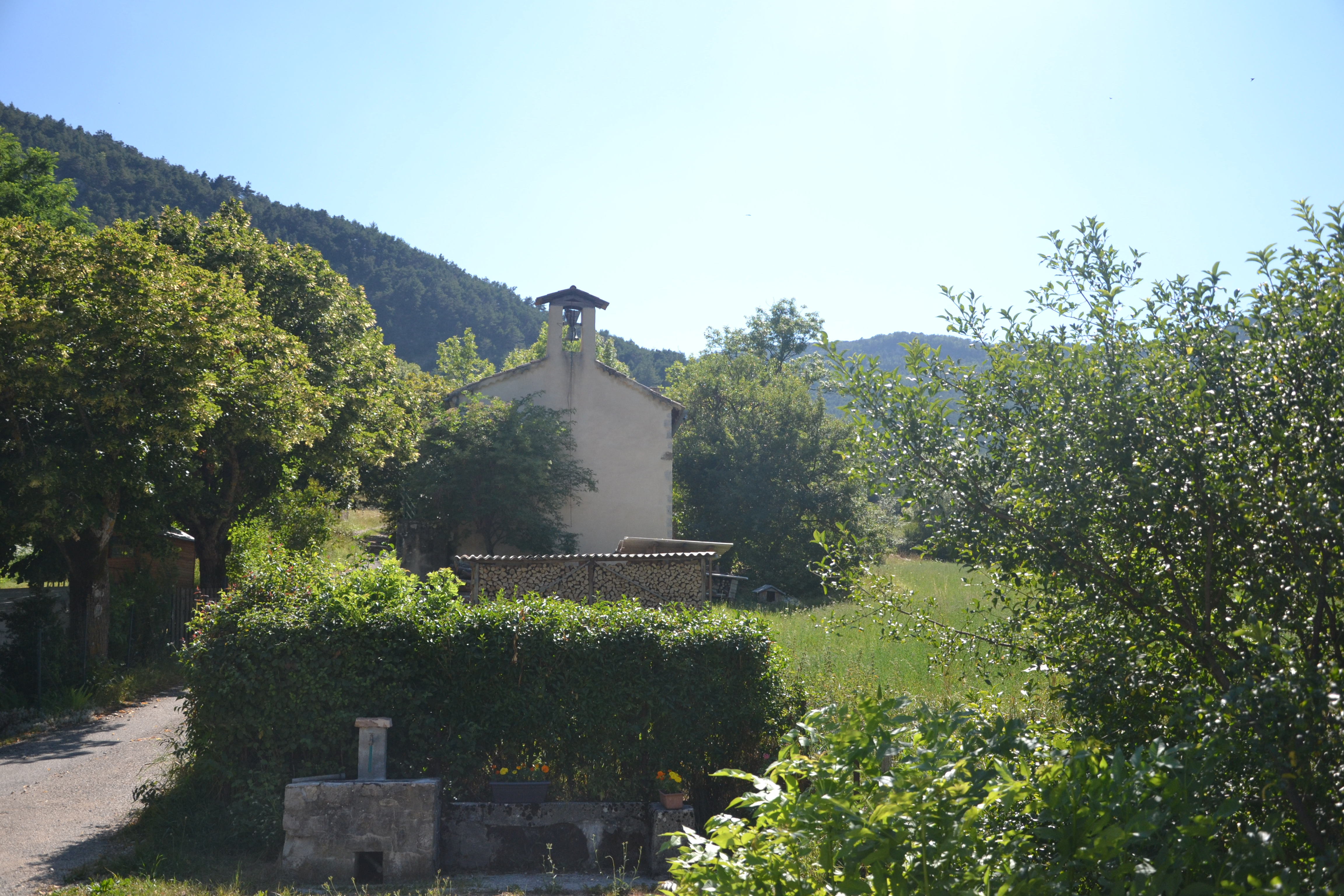 Le temple d'Establet